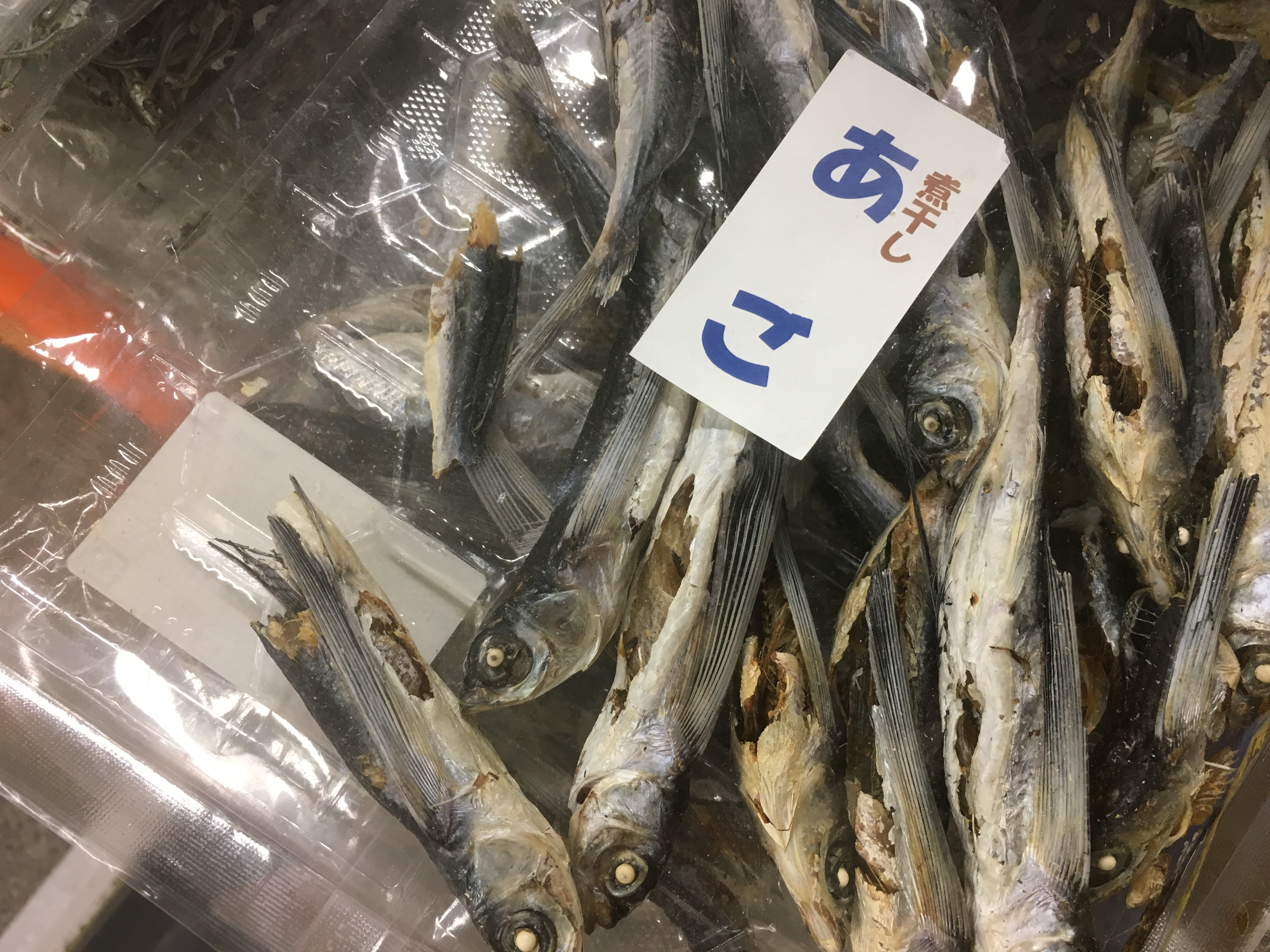 あご / トビウオ (flying fish)